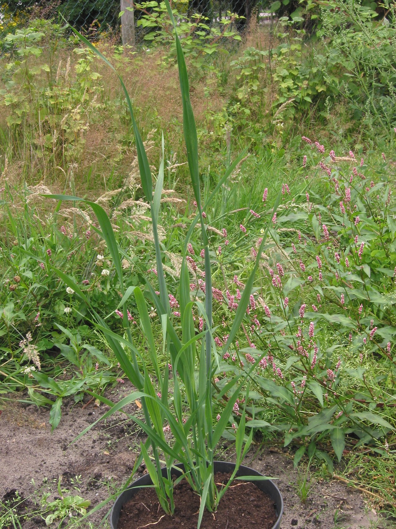 (Haverplant) Avena sativa